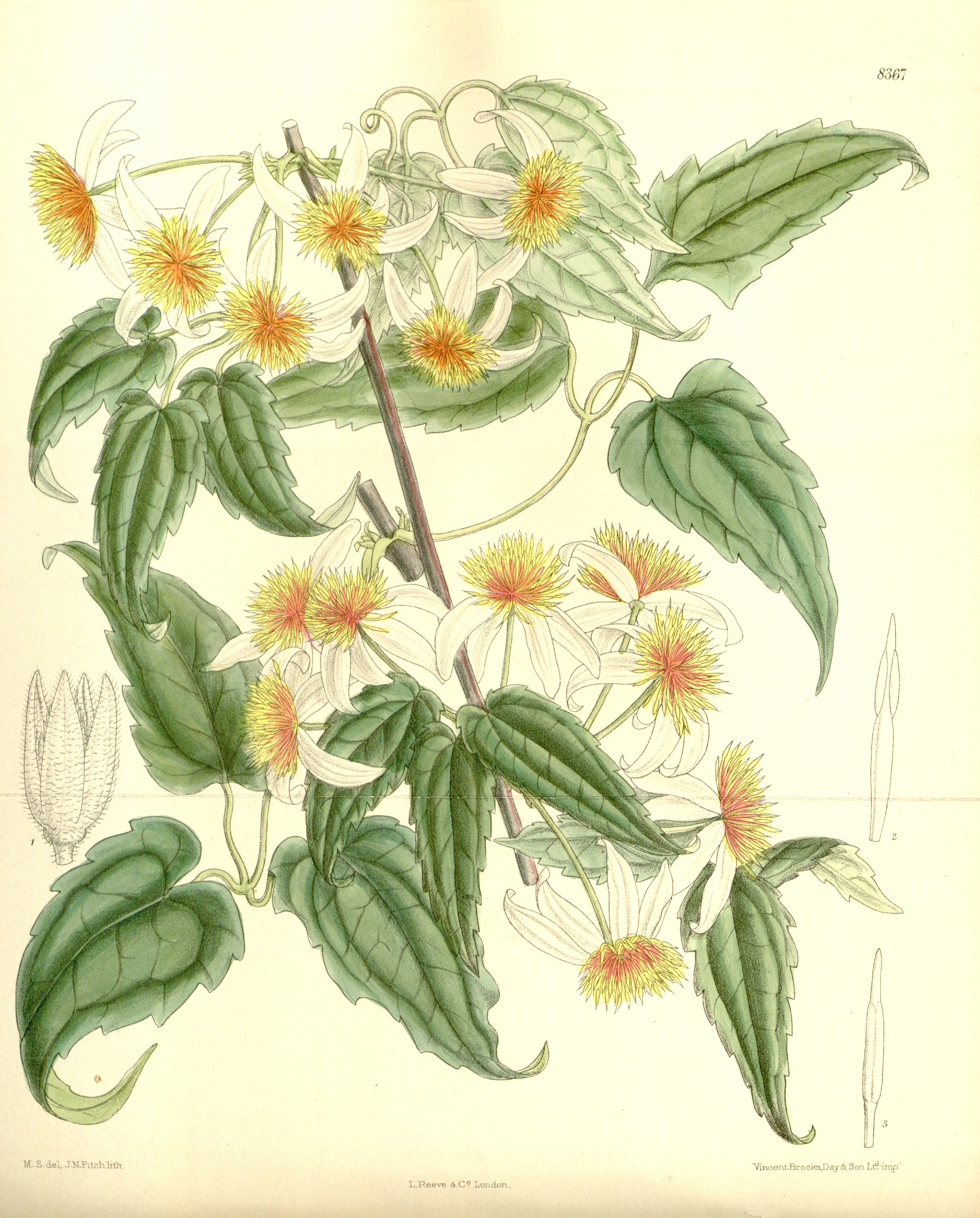 Clematis aristata var. dennisae, Ranunculaceae